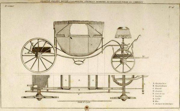 Diligence anglaise montée à la Polignac s'ouvrant derrière et devant en forme de cabriolet, 1776 (cahier de dessins Moreau).